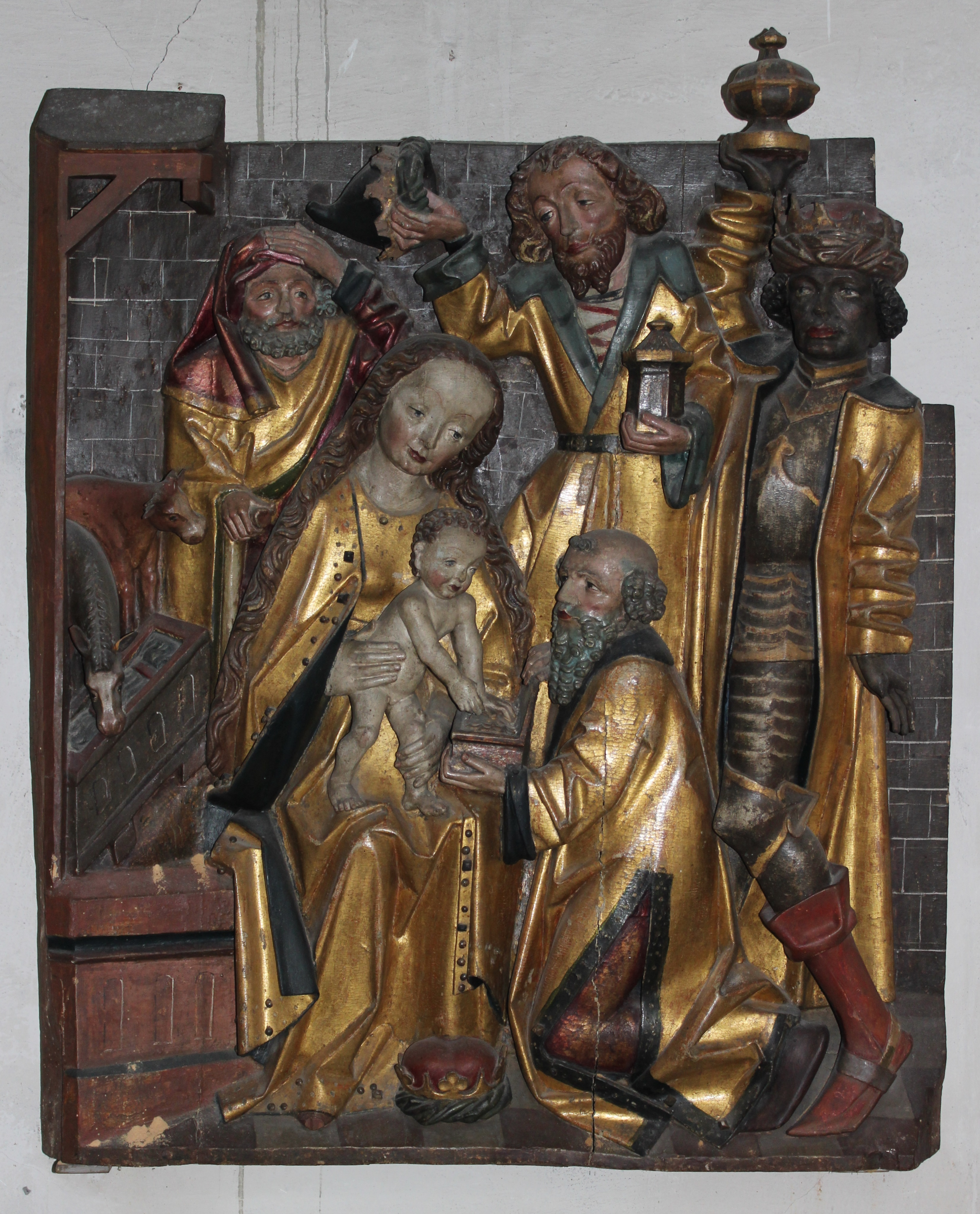 Unserer Lieben Frau Linderbach, Altarbild Heilige Drei Könige